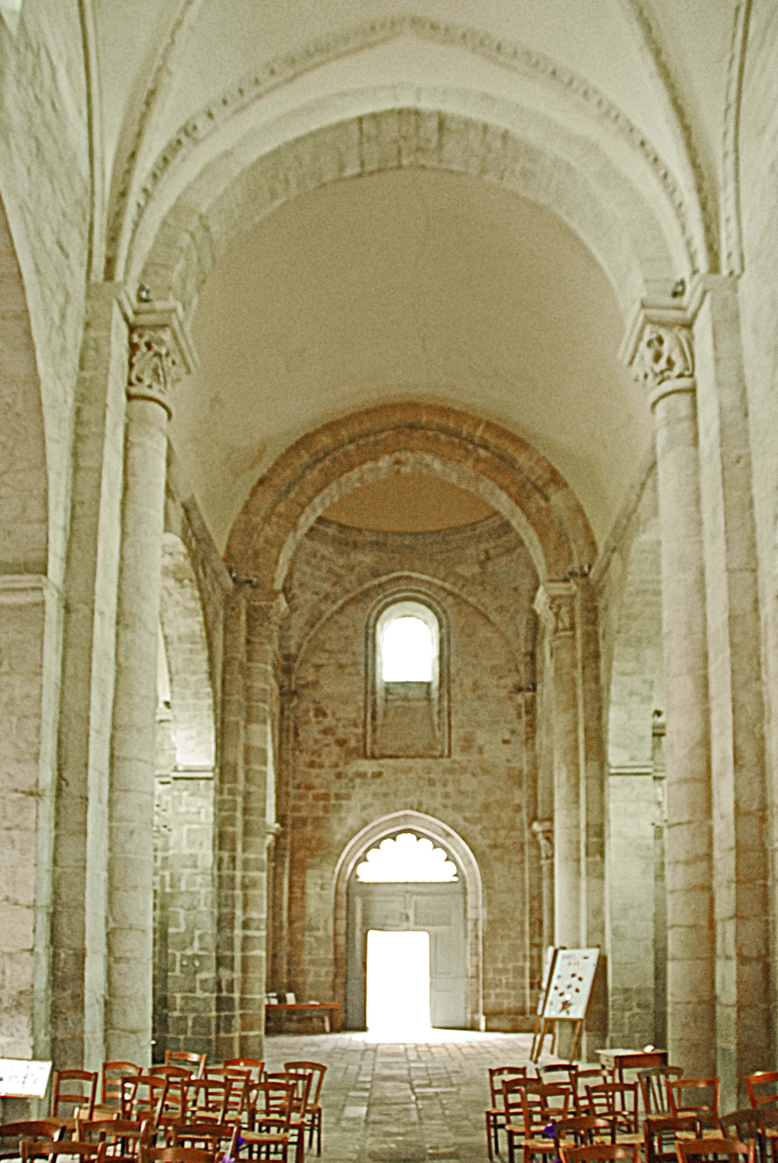 N.-D. de La Souterrain, Mittelschiff, aus Joch 3 nach hinten